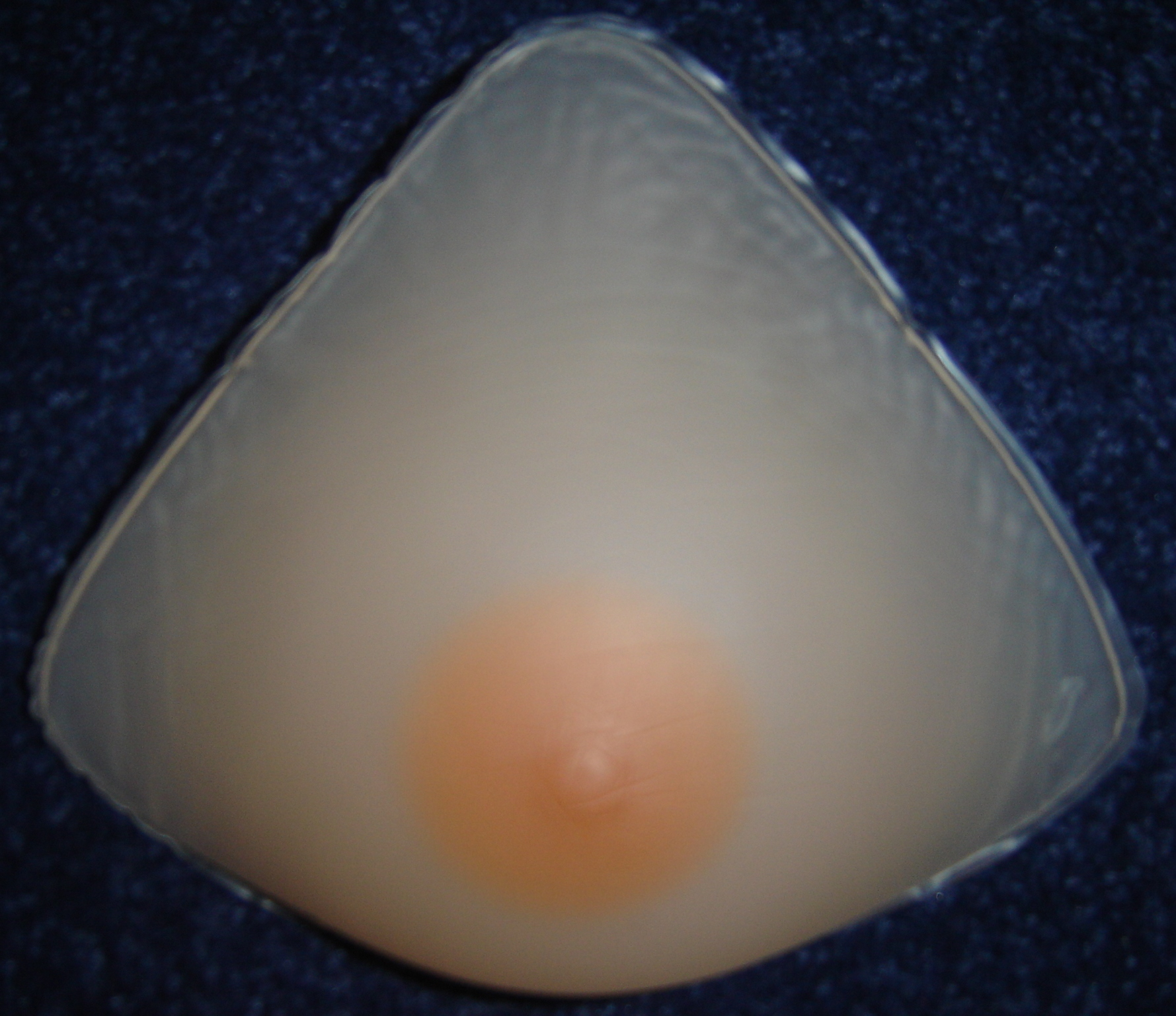 Borstprothese met gekleurde tepel